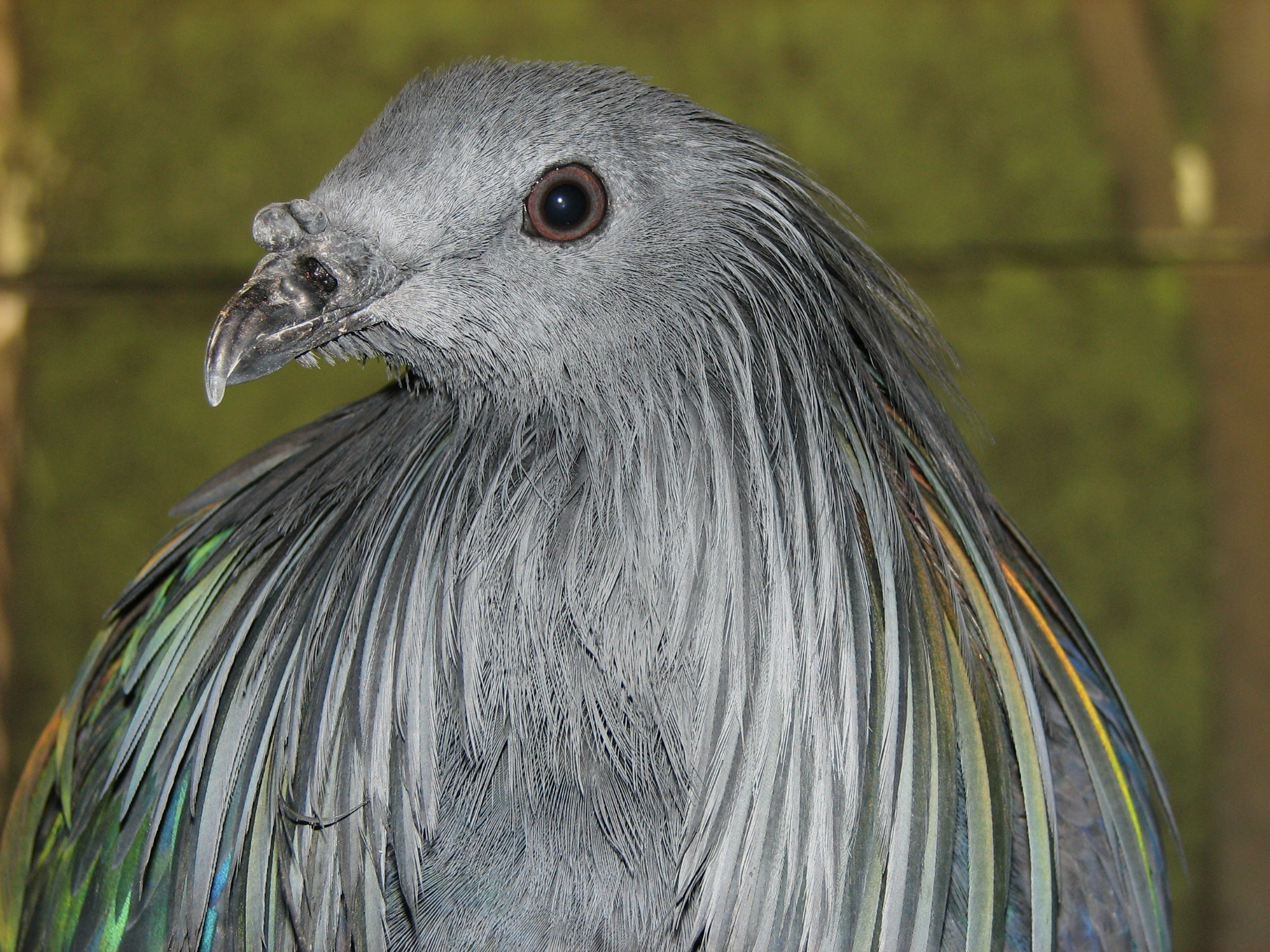 Nicobar Pigeon at Louisville Zoo